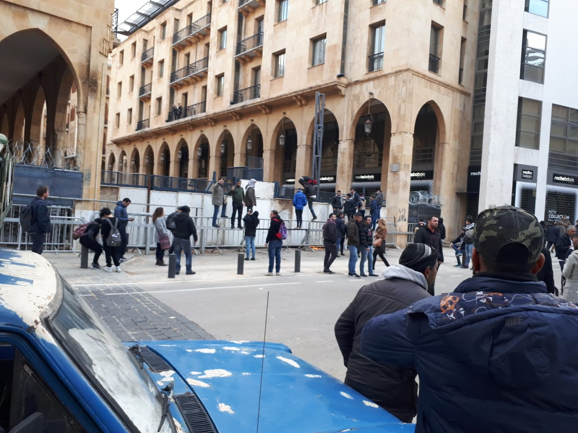 Proteste in der Beiruter Innenstadt. Zu sehen sind die Absperrung der Straße zum Parlamentsgebäude